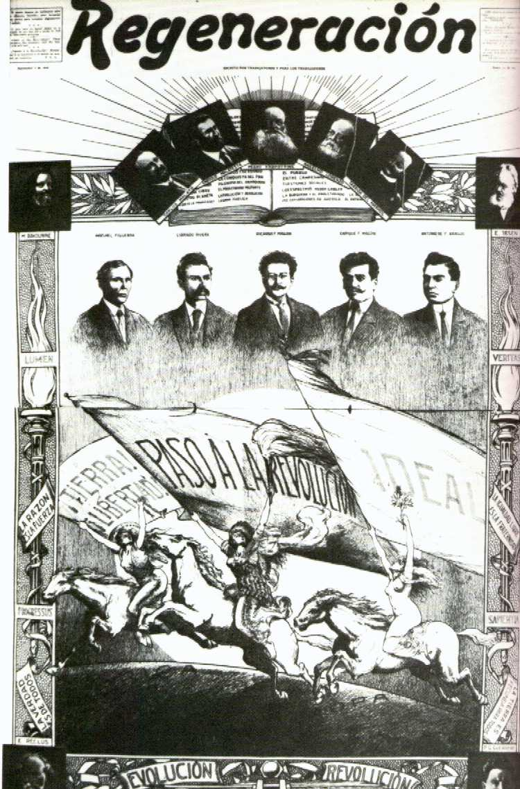 Portada del periódico Regeneración, editado por los hermanos Flores Magón, 3 de septiembre de 1910.